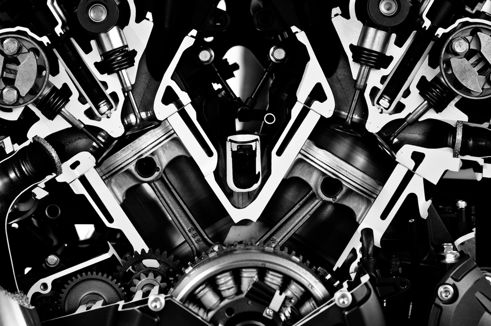 VMAX day 2009. Engine cutaway, side.